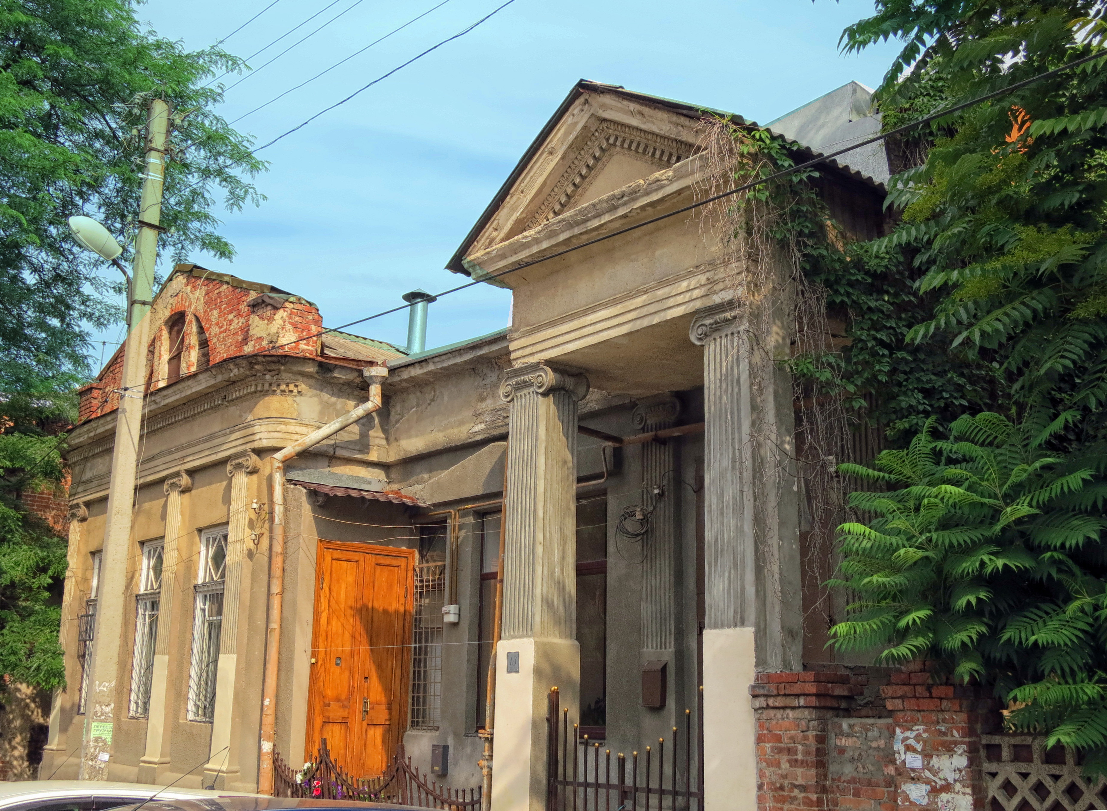 Особняк Г.В. Трунова: улица Темерницкая, 13, литеры А, А1, Ростов-на-Дону, Ростовская область